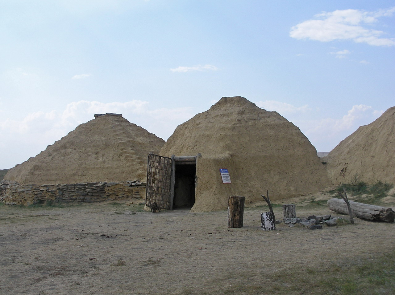 Аркаим Реконструкция жилища каменного века